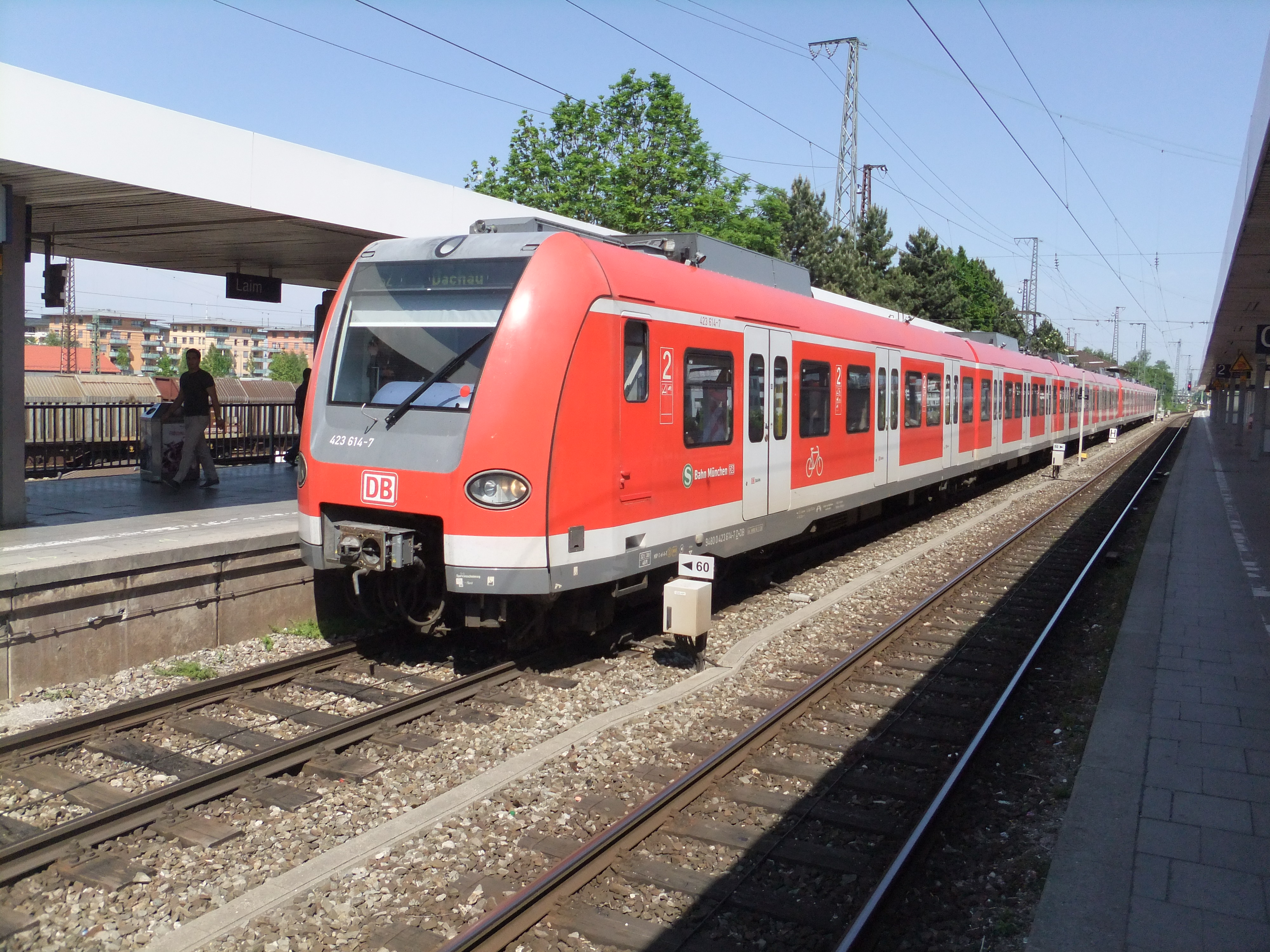 DBAG-Baureihe 423 der S-Bahn München auf der Linie S2 im Bahnhof München-Laim